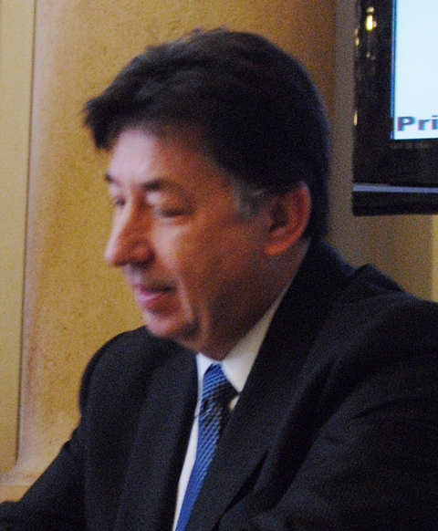 Ján Budaj